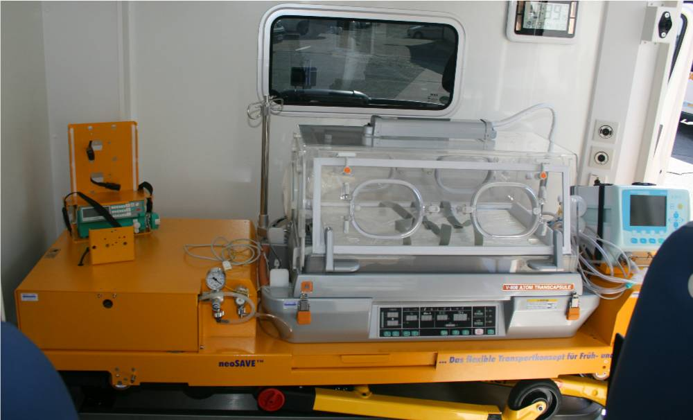 Inkubator auf dem Tragentisch im Fahrzeug